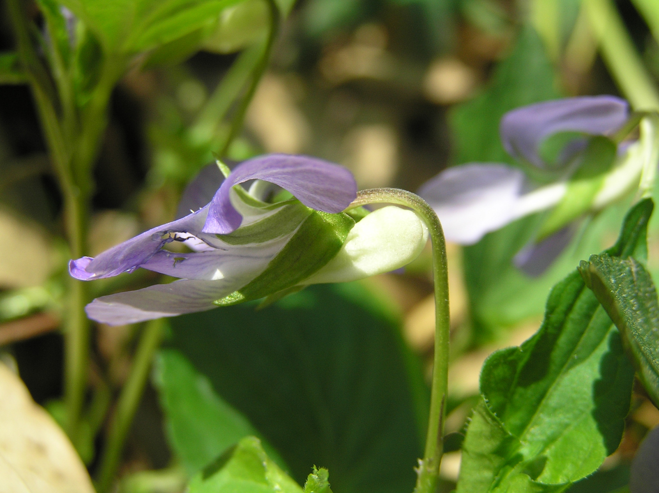 Viola riviniana, Kančí obora near Břeclav, Czech Republic